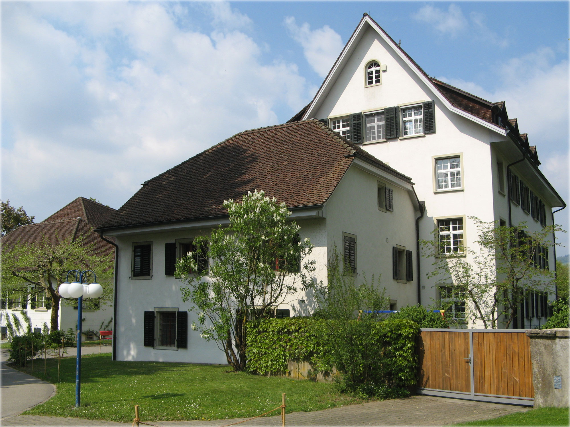 Kloster Gnadenthal: Beichtigerhaus am Südflügel des Zentralbaus